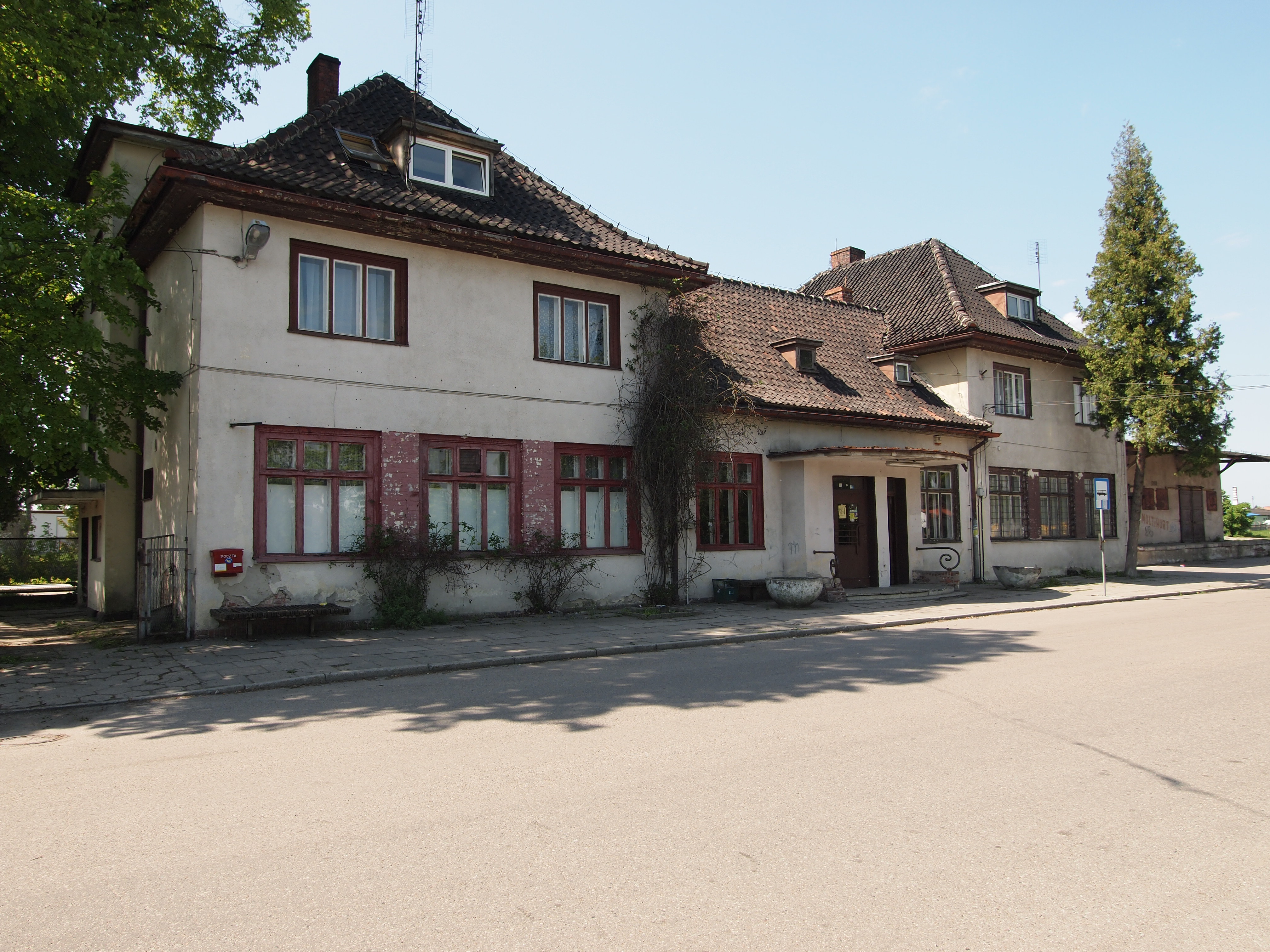 Sztum, dworzec kolejowy (strona wschodnia).